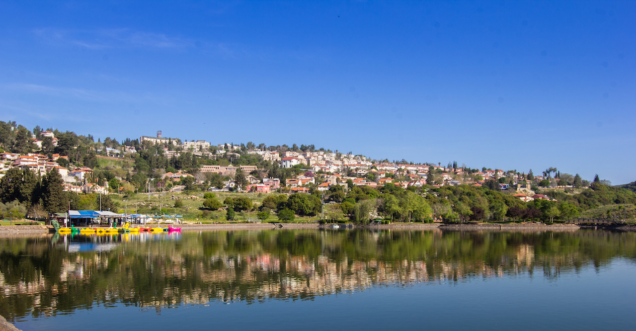 מבט על העיר מזרח - העיר נשקפת לאגם